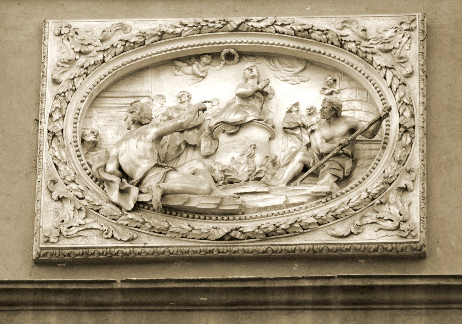 Palermo